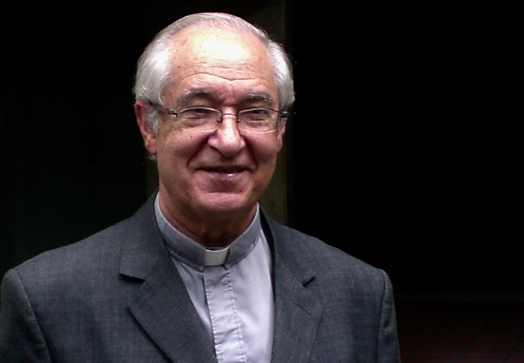 Luis Ugalde s.j., historiador y académico jesuita.